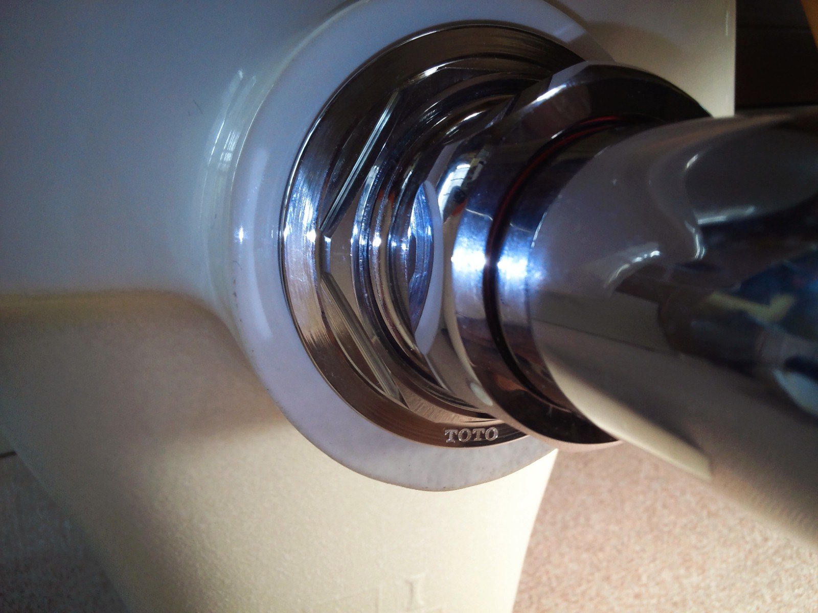 スパッド接続